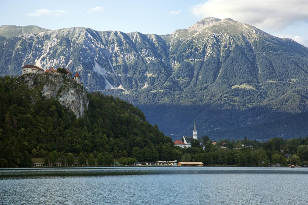 Slovenia